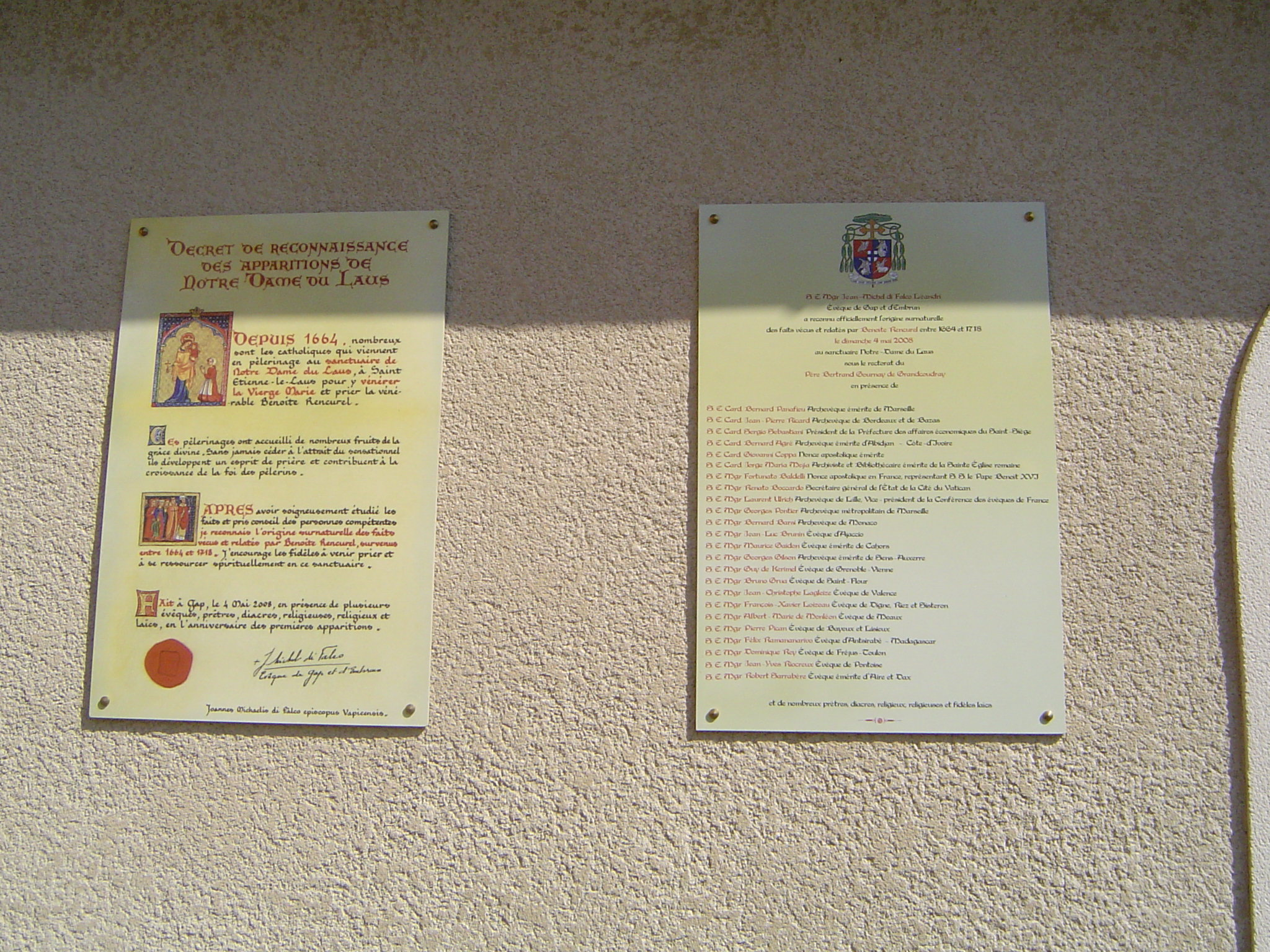 Photo prise à Notre-Dame-du-Laus